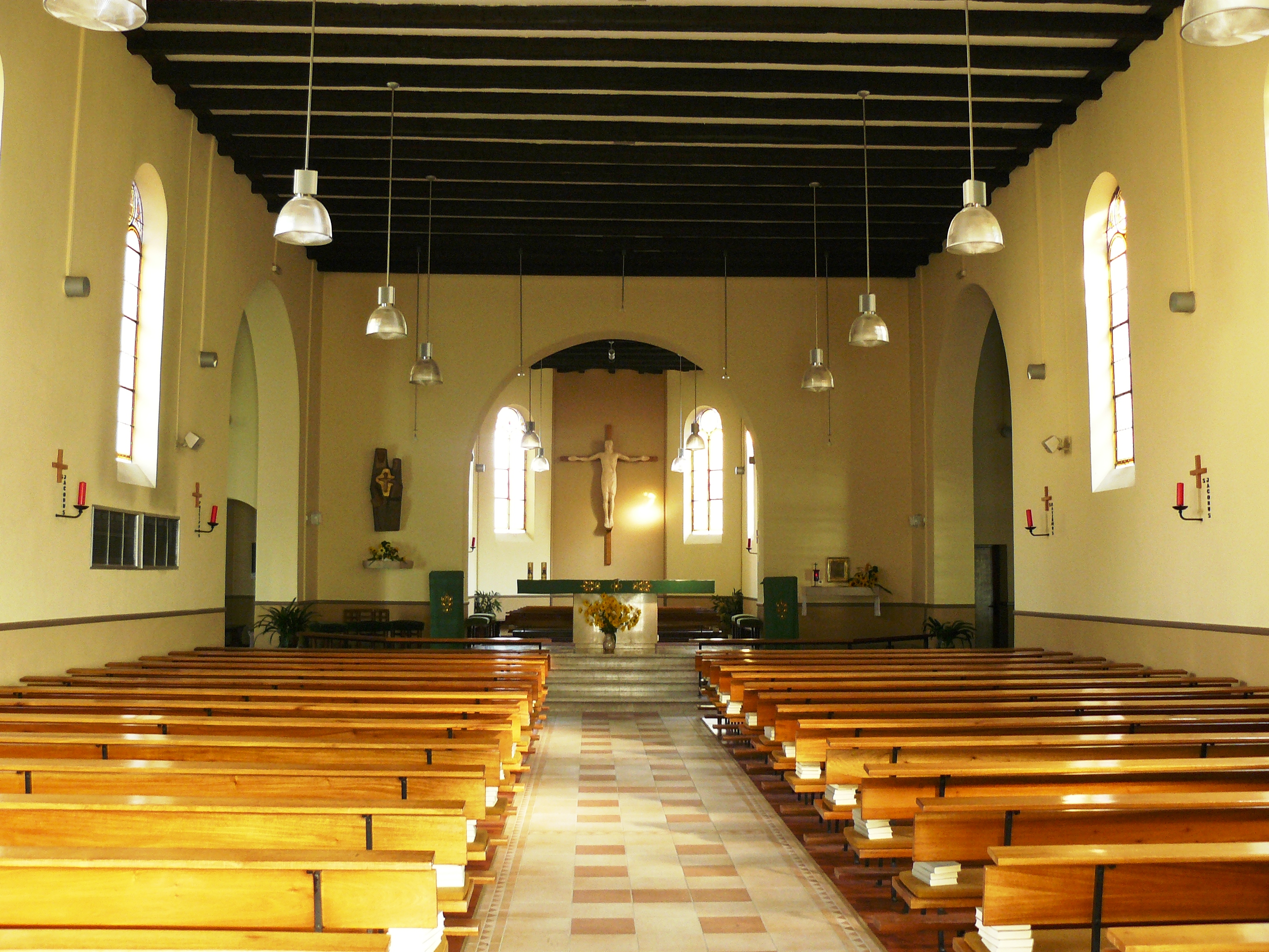 Intérieur de l'église Sainte-Anne